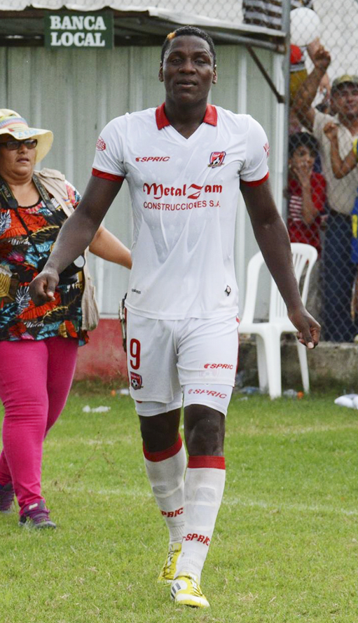 Ginson Gangá jugando para Colón FC en el 2015